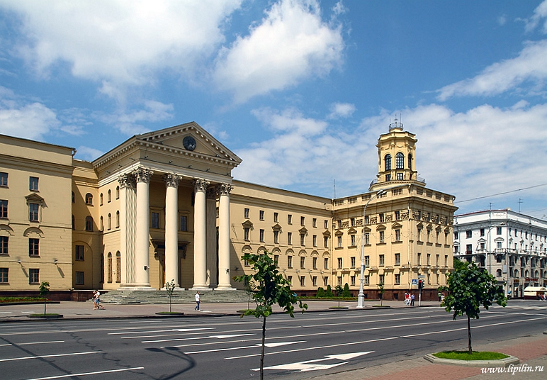 Мінск. КДБ